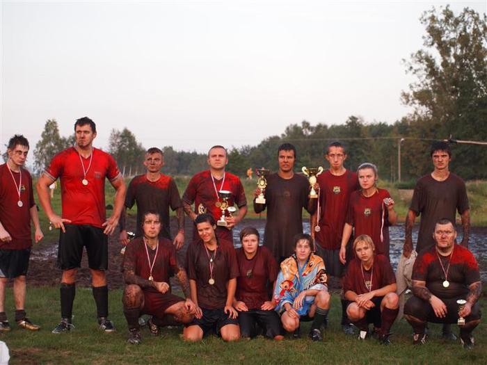 BKS Roztocze - Mistrz Polski 2011 w piłce błotnej